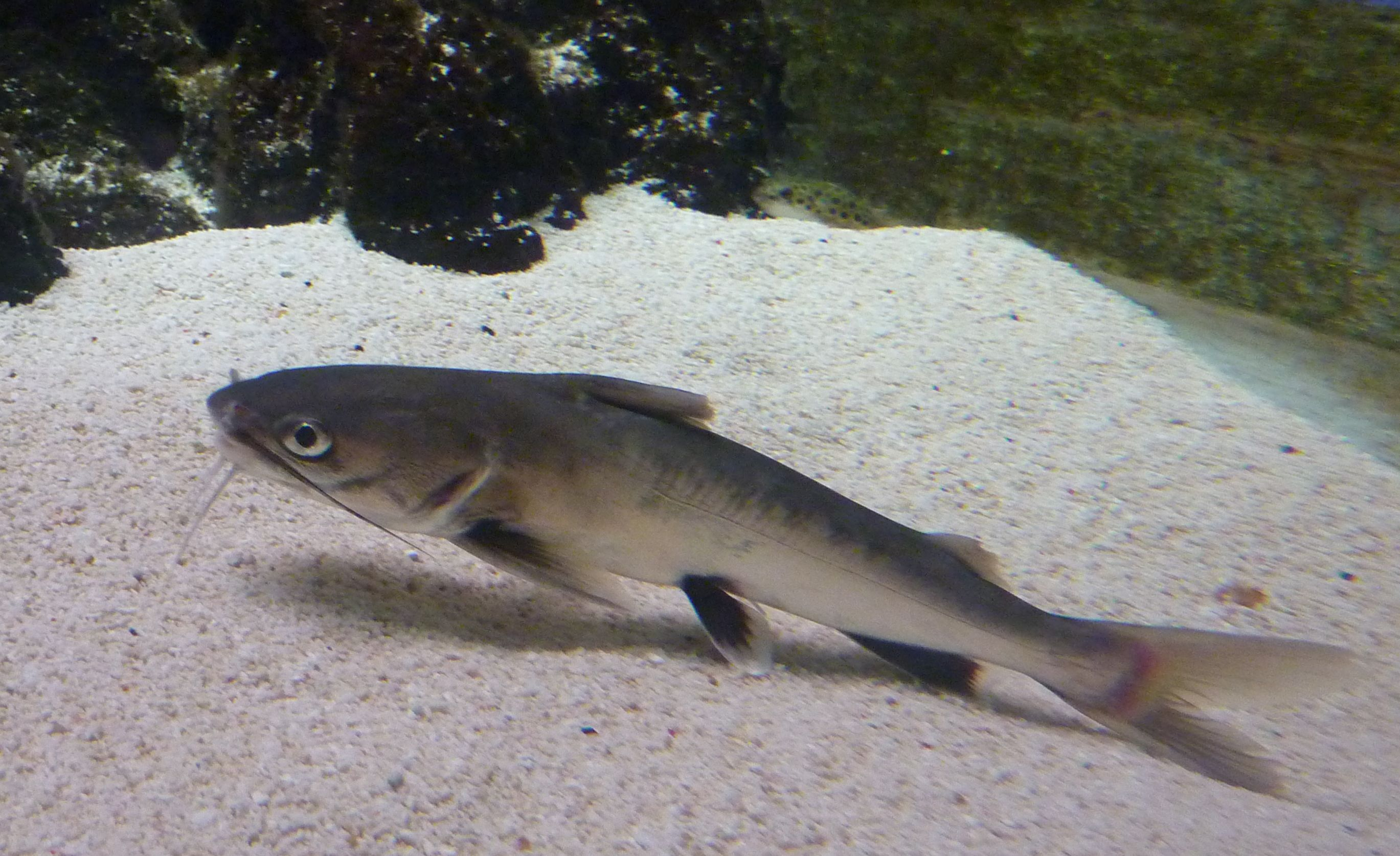 Sciades seemanni